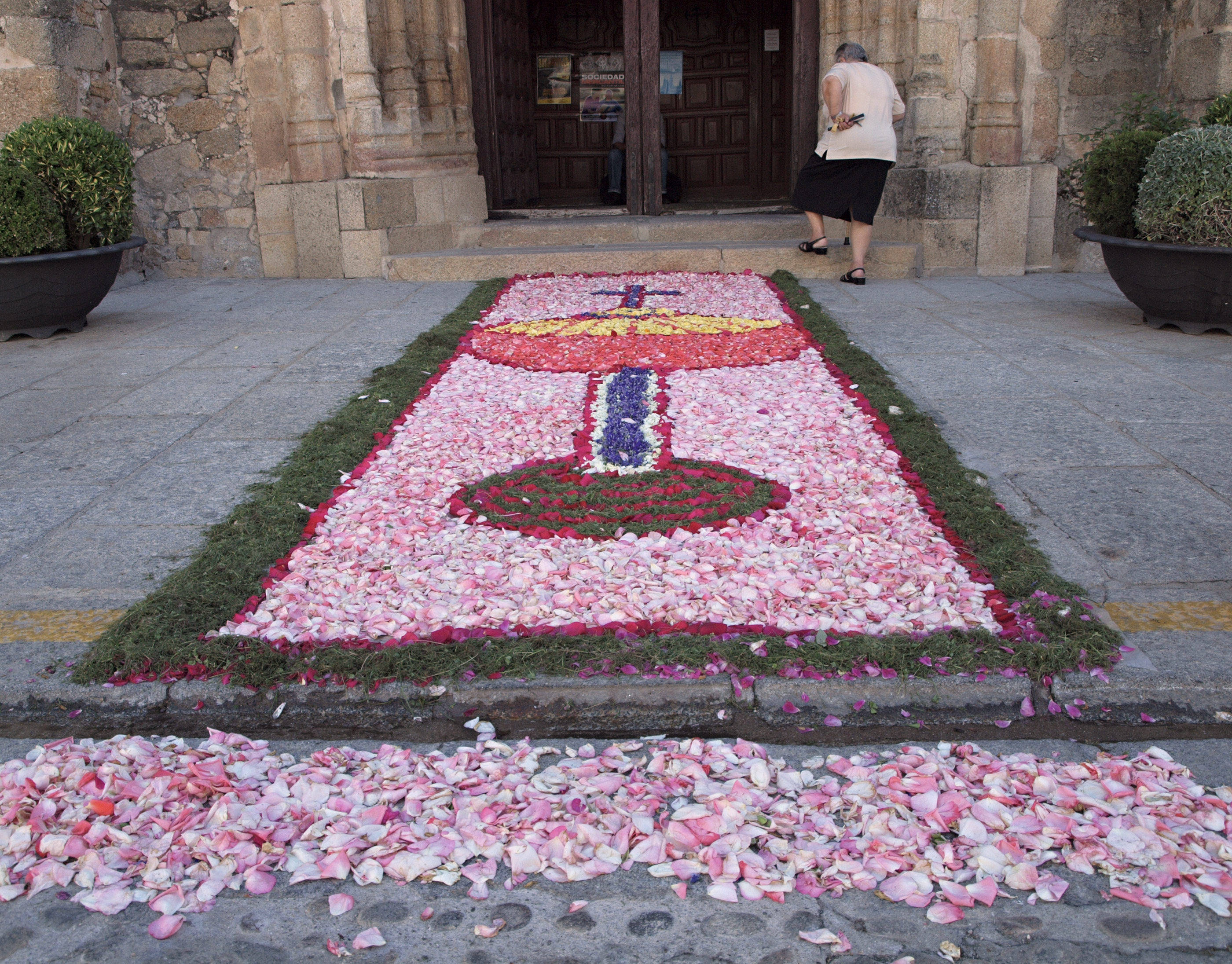 Losar de la Vera, Cáceres, España. Alfombra de flores en la fiesta del Corpus Christi.